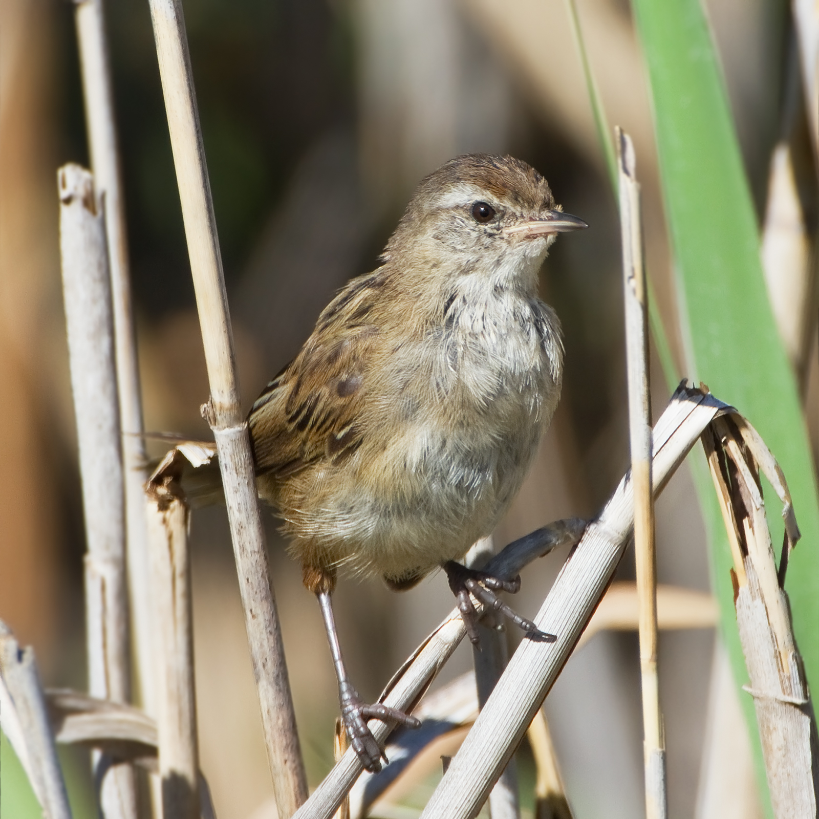 Little Grassbird (Megalurus gramineus) juvenile, Gould's Lagoon, Tasmania, Australia